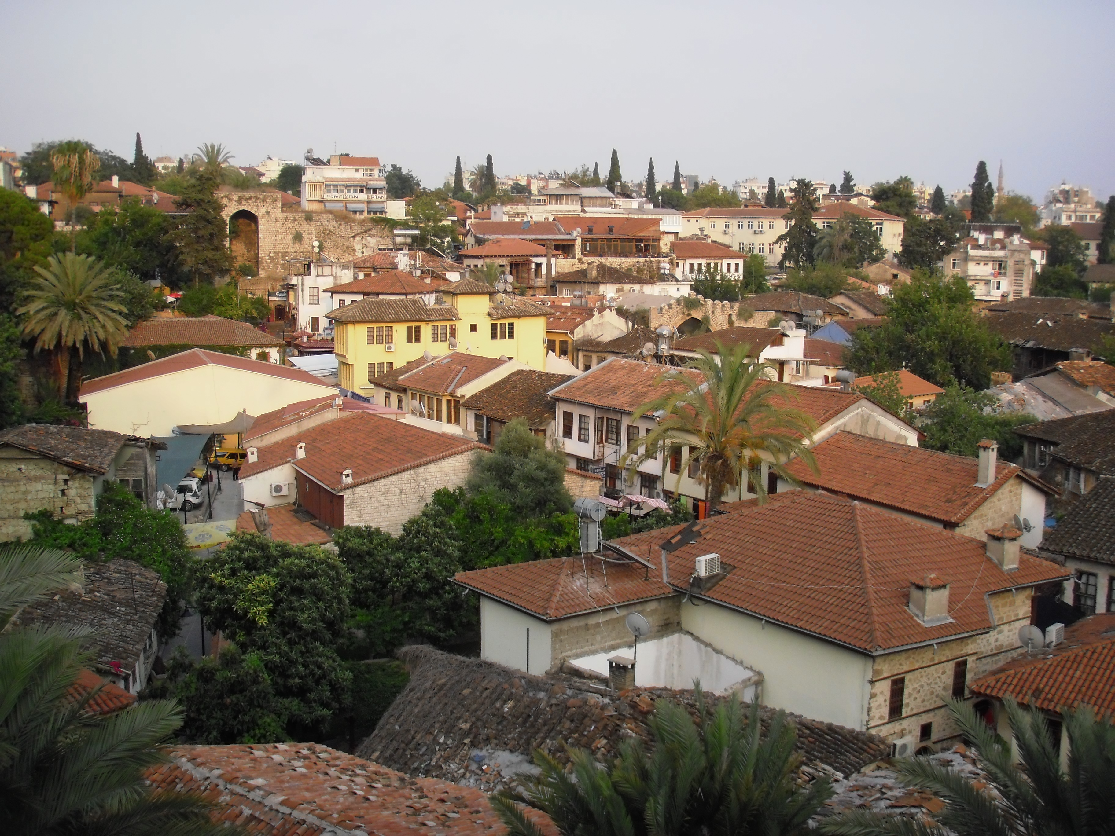 Antalya - 2010